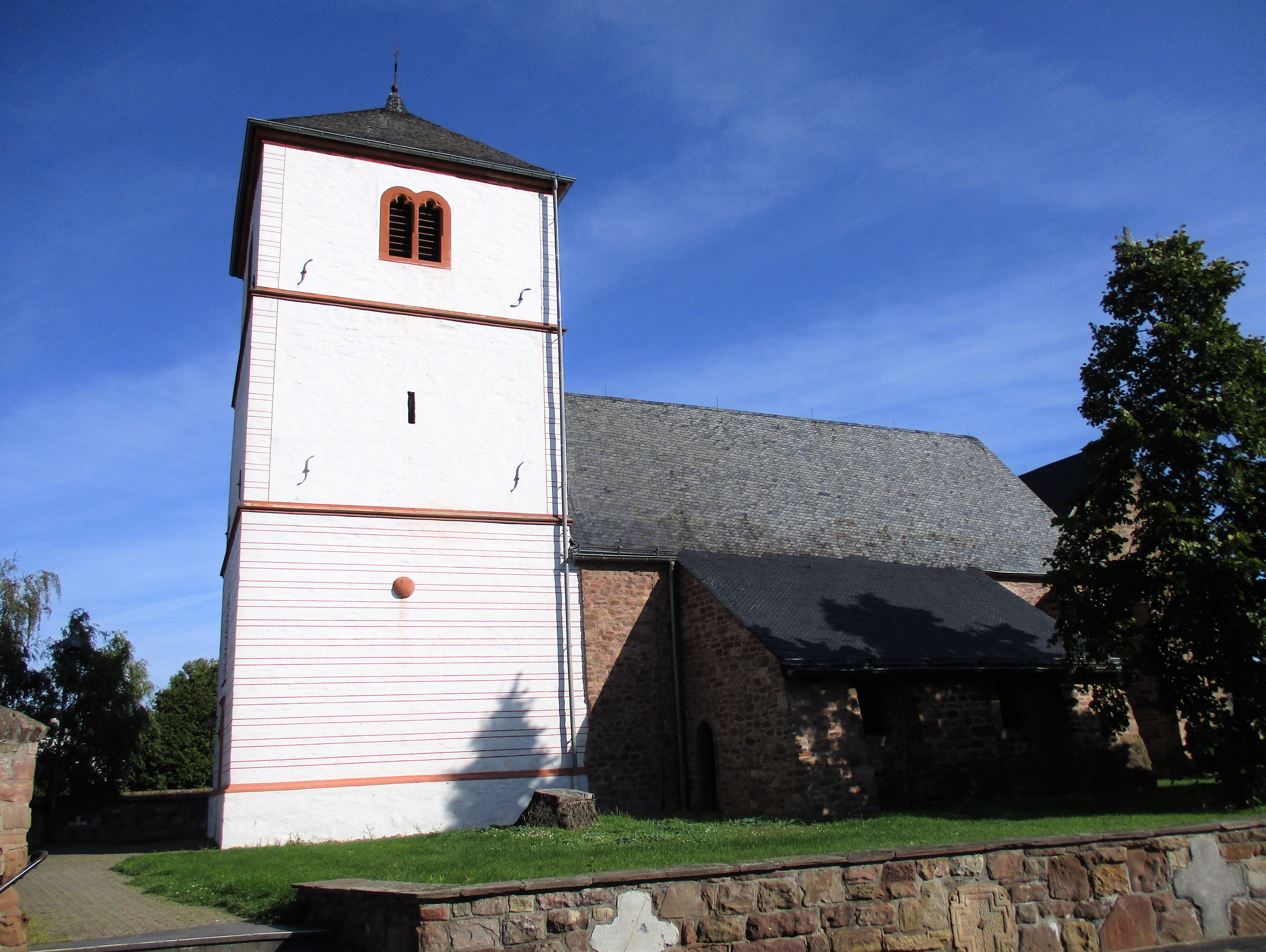 Alte Pfarrkirche Kreuzau - Stockheim, Denkmal - Nr. 42